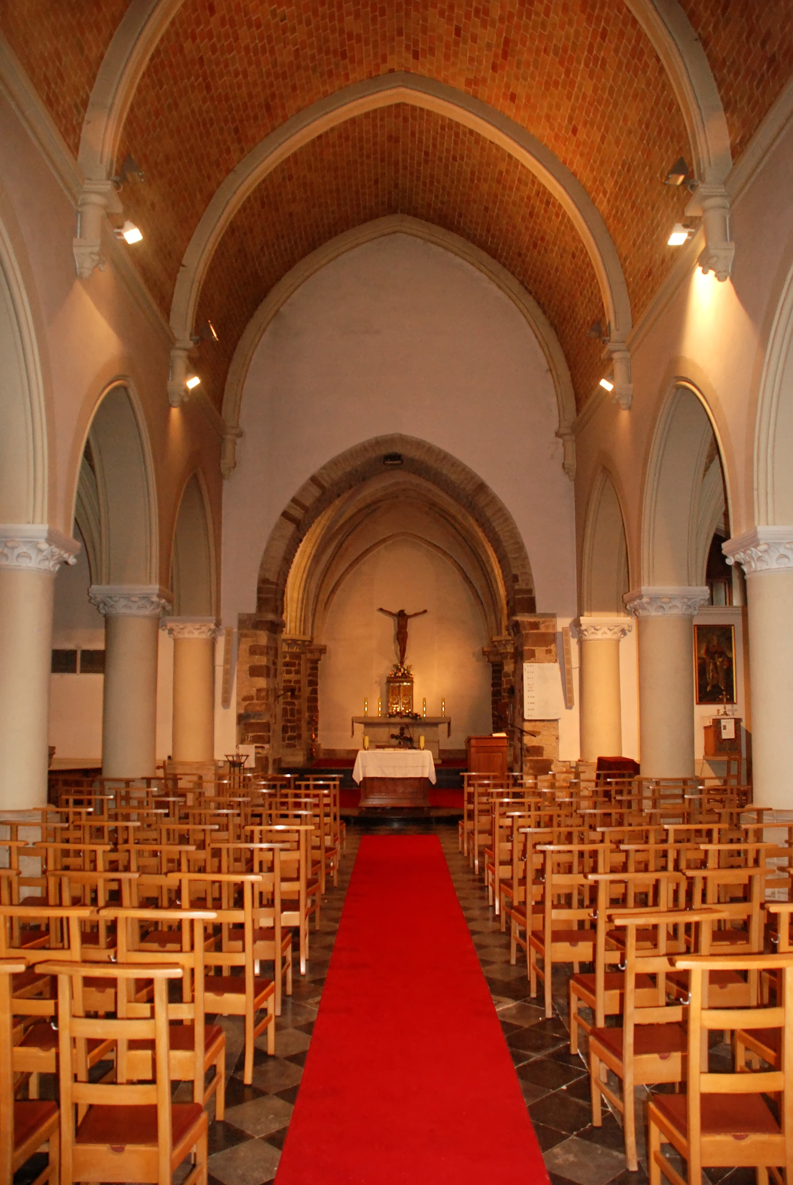 Belgique - Brabant wallon - Chaumont-Gistoux - Église Saint-Bavon de Chaumont